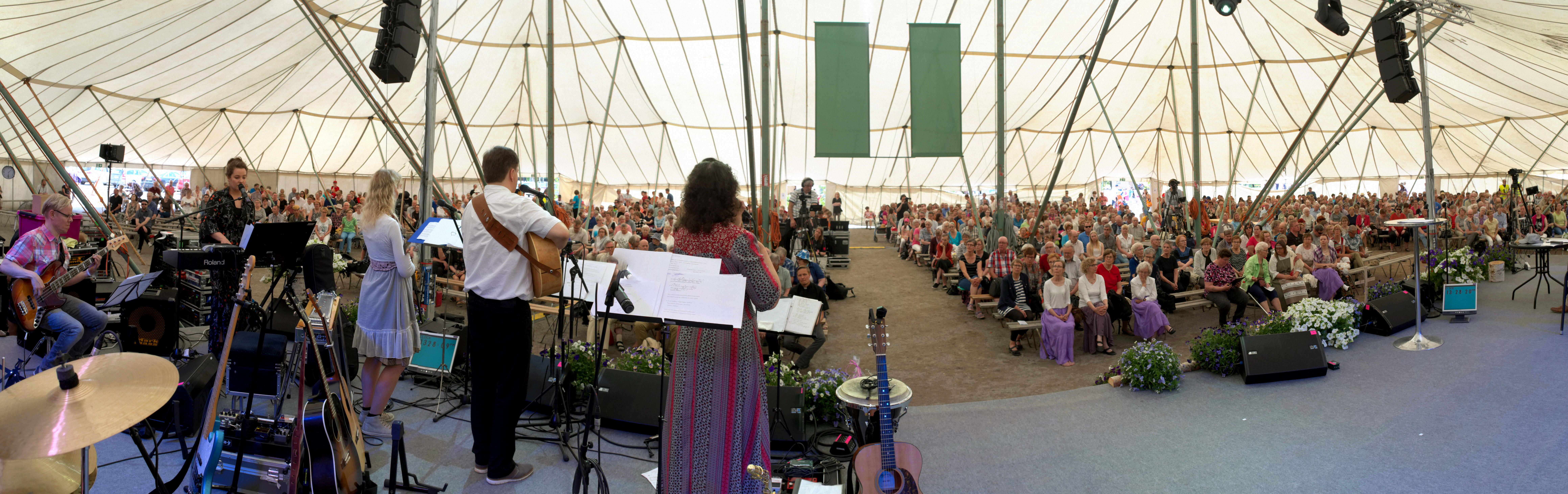 Timo ja Kaisa Tuikkasen perheorkesterin levynjulkistuskeikka Sanan suvipäivillä Imatralla 17.6.2017